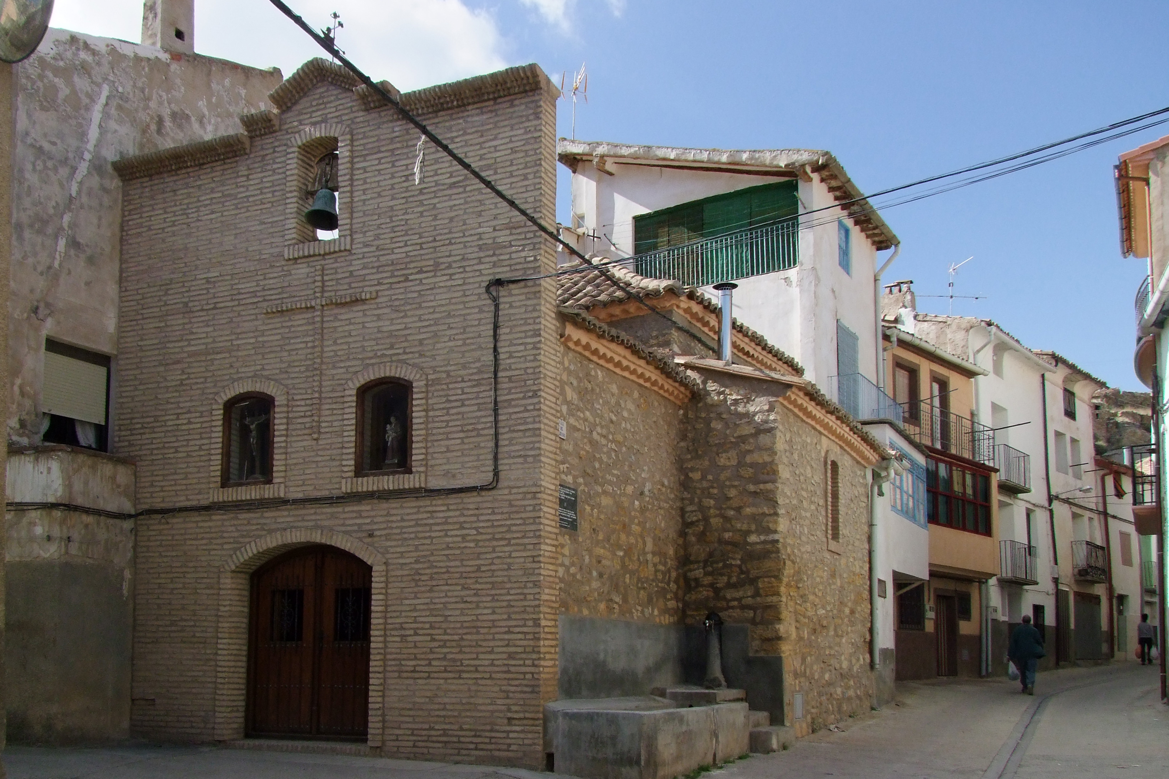 Ermita de San Antonio de Padua en la localidad de Inestrillas, La Rioja - España